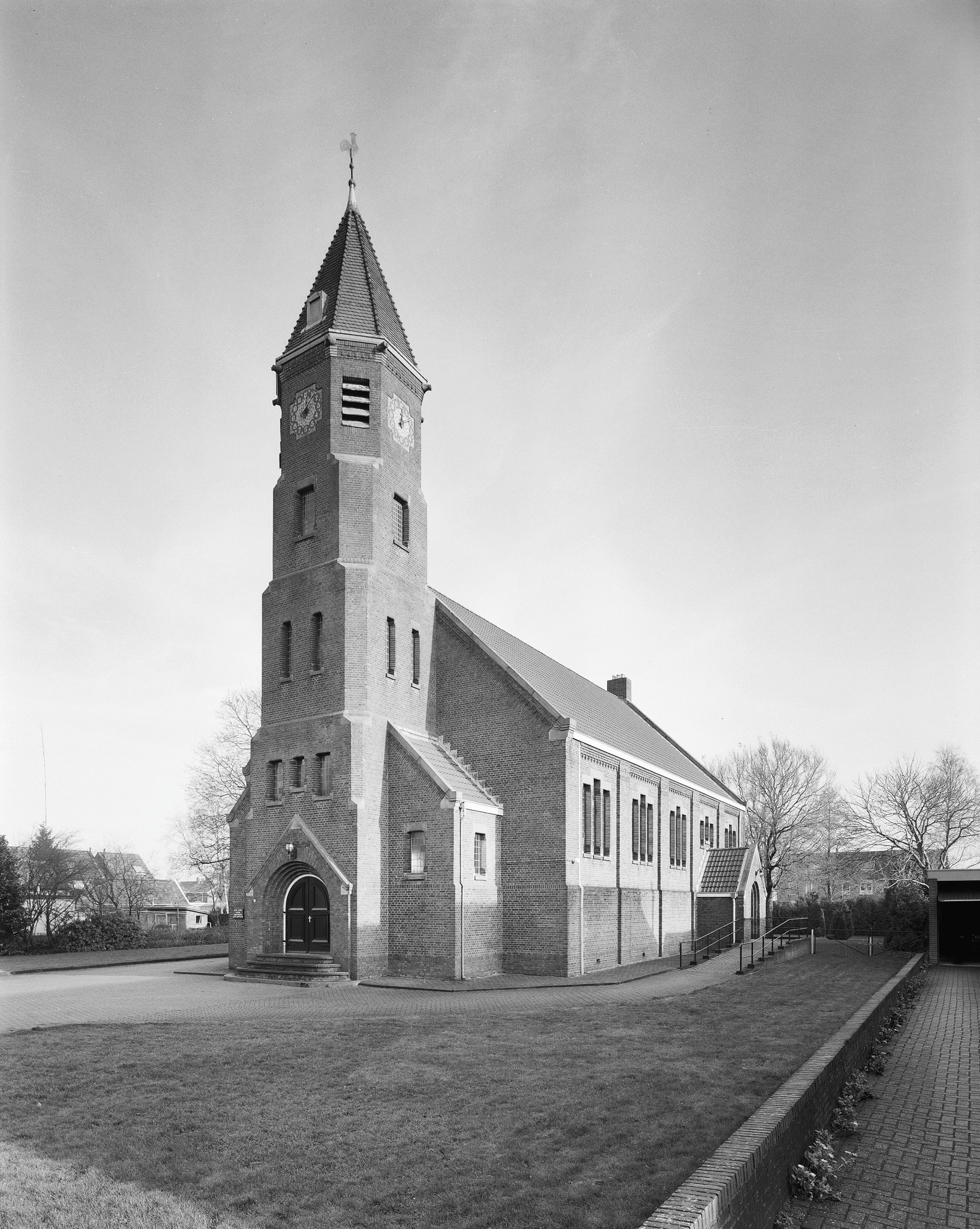 Nederlands Hervormde Kerk: Exterieur overzicht toren en kerk, zuidwestgevel, toren met achtkantige bekroning met tentdak. (opmerking: Monumenten In Nederland Drenthe)